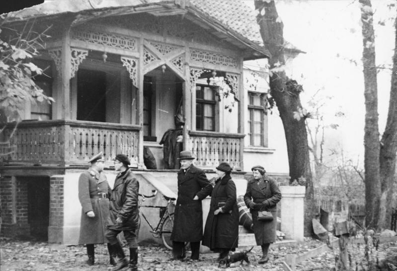 Warthegau, Baltendeutsche Umsiedler Scherl Bilderdienst, Berlin Baltendeutsche besichtigen ihre neue Heimat im Warthegau Schon viele Tausend Baltendeutsche sind nunmehr in die befreiten Gebiete des ehemaligen Polen umgesiedelt worden und setzen hier den Aufbau, der durch die Polen 20 Jahre unterbrochen war, fort. Unser Bild zeigt Baltendeutsche nach der Ankunft in ihrem neuen Heim im Warthegau beim ersten Rundgang. 10.11.39 [Herausgabedatum] (Scherl Picture-Service, Berlin. Baltic Germans inspect their new homeland in Warthegau. Many thousand Baltic Germans have already moved into the regions freed from the former Polish occupiers after their 20-year interruption, and have begun building up. Our picture shows Baltic Germans during their first walk around their new home in Warthegau.)